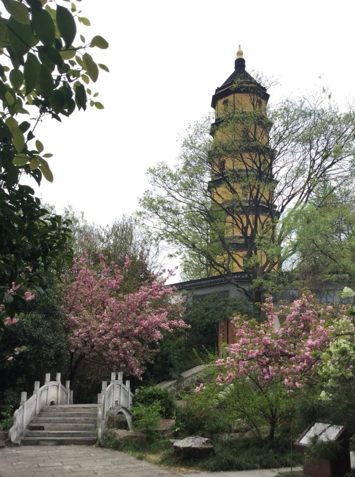 宝塔山公园樱花小筑上、郁金樱花前拍摄的僧伽塔